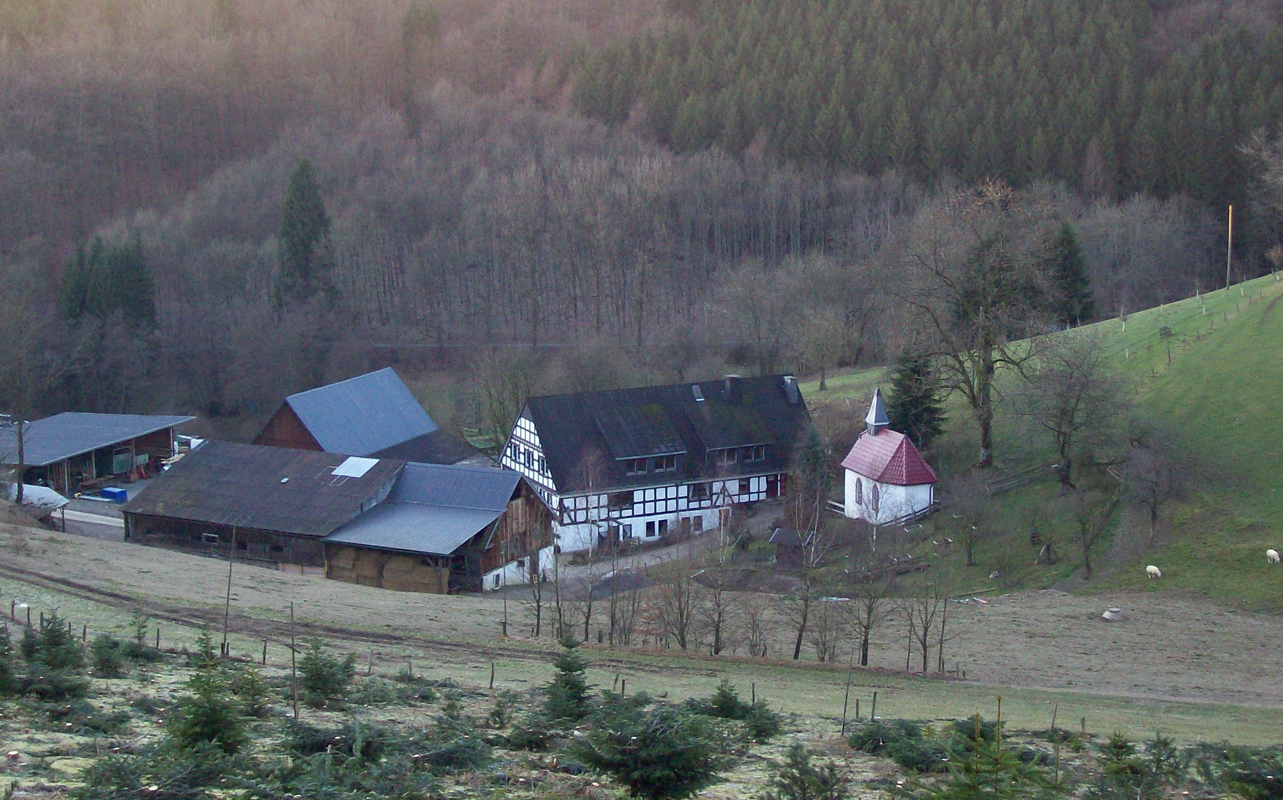 Hebbecke, Schmallenberg (Germany)